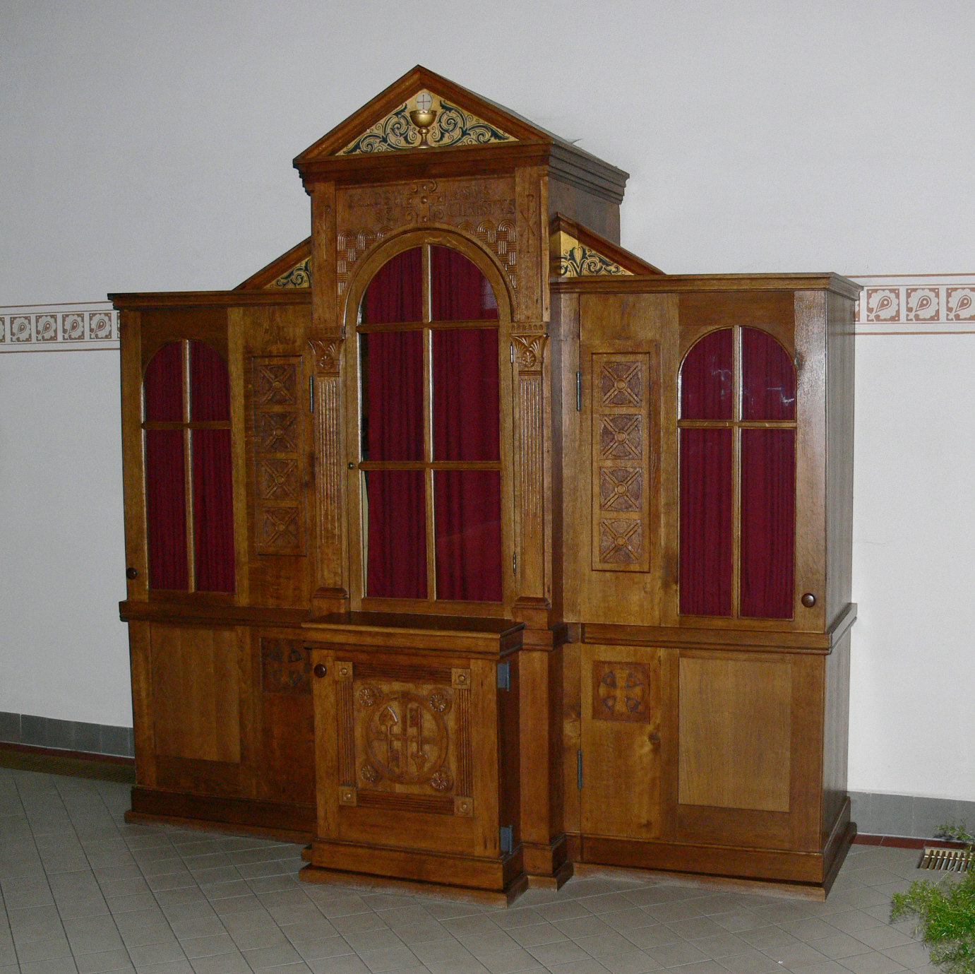 Pfarrkirche St. Martin, Hundersingen: Beichtstuhl, aus der Werkstatt Gebhard und Franz Müller (Saulgau)